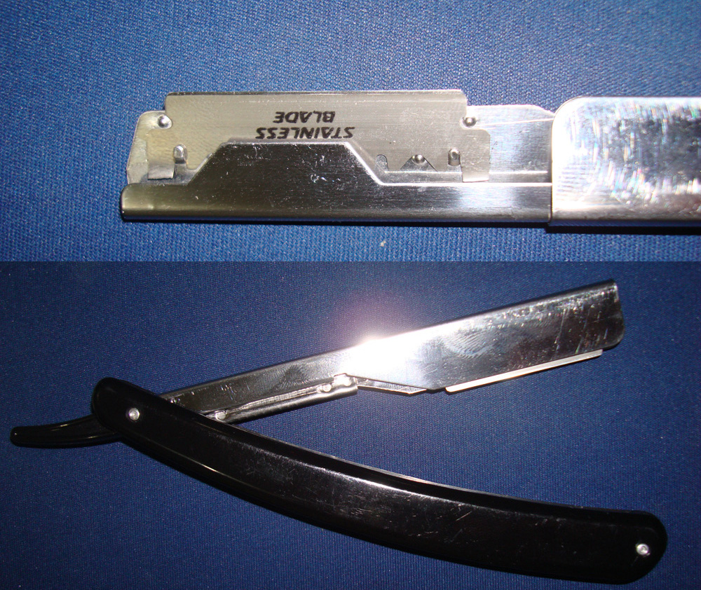 Navaja para afeitar de hojas desechables